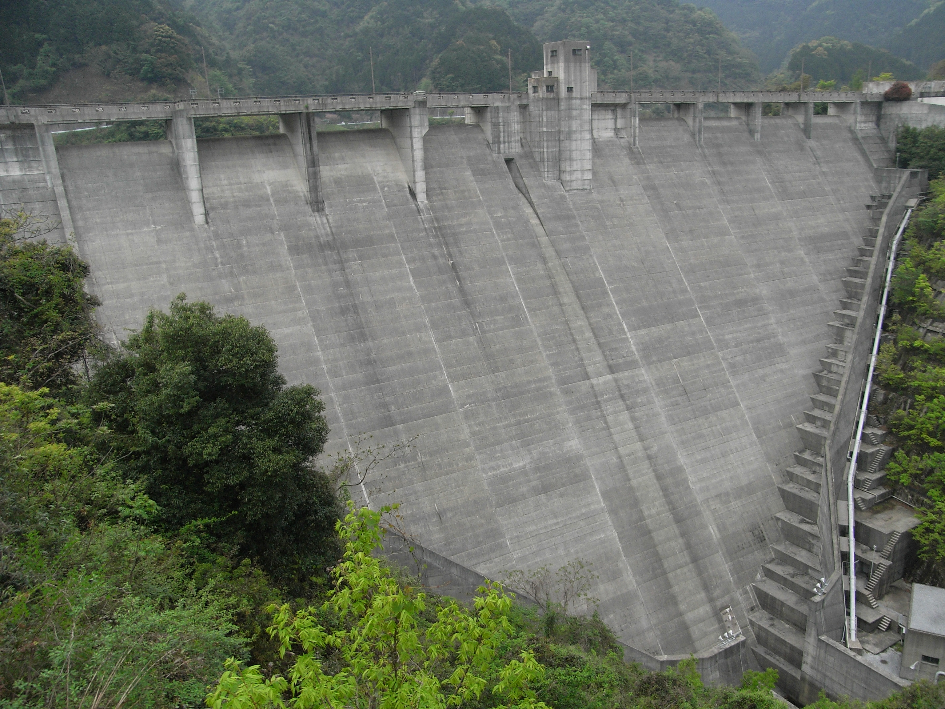 Dam